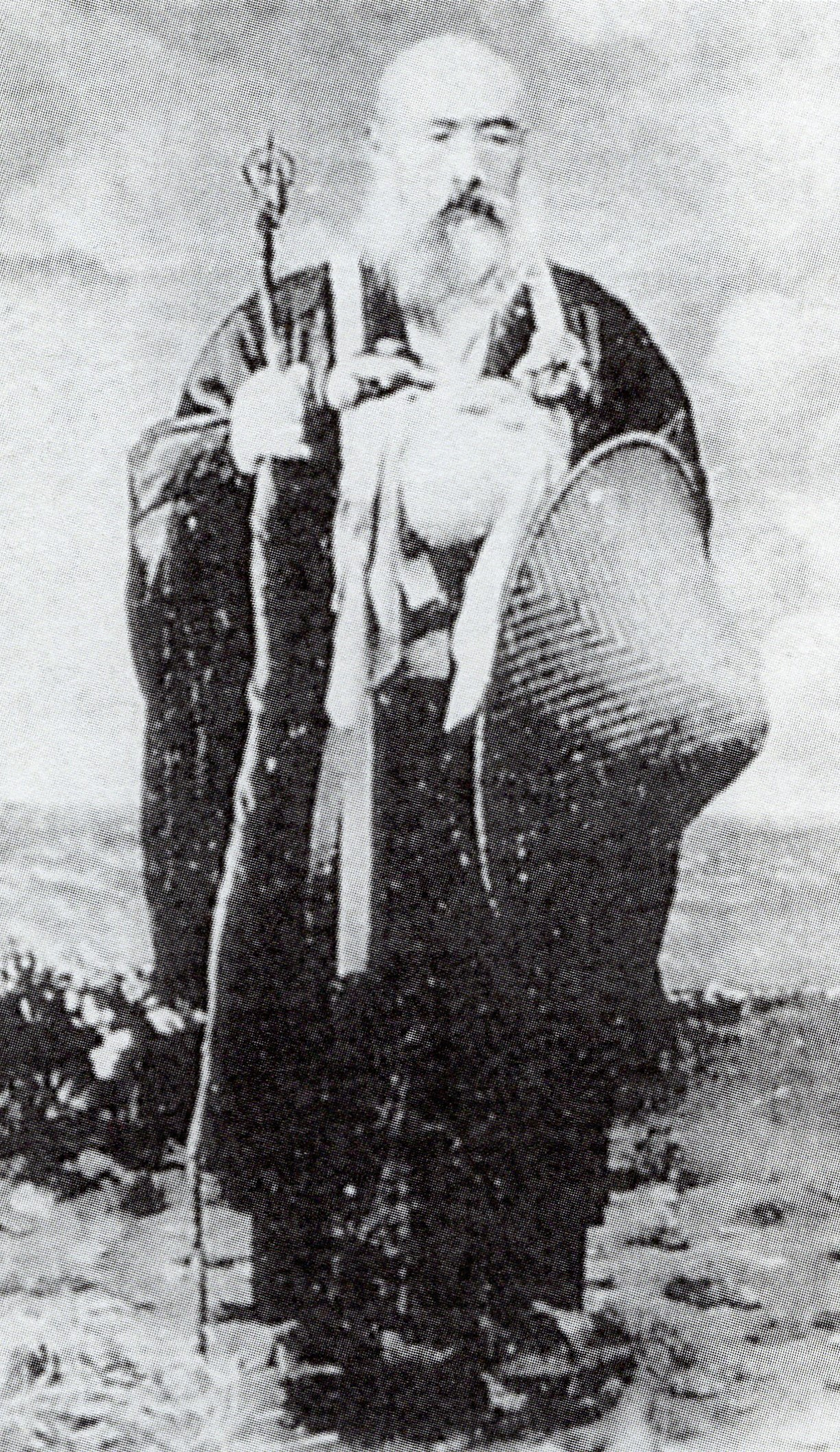 細谷直英の肖像写真。